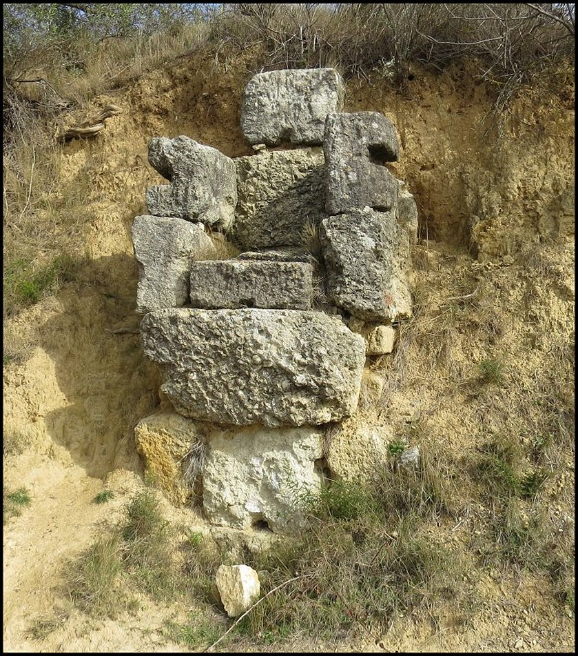 Edifice en blocs calcaires, pouvant provenir, du moins en partie, d'un aqueduc antique. Route de Vivios (Lespignan, Hérault))